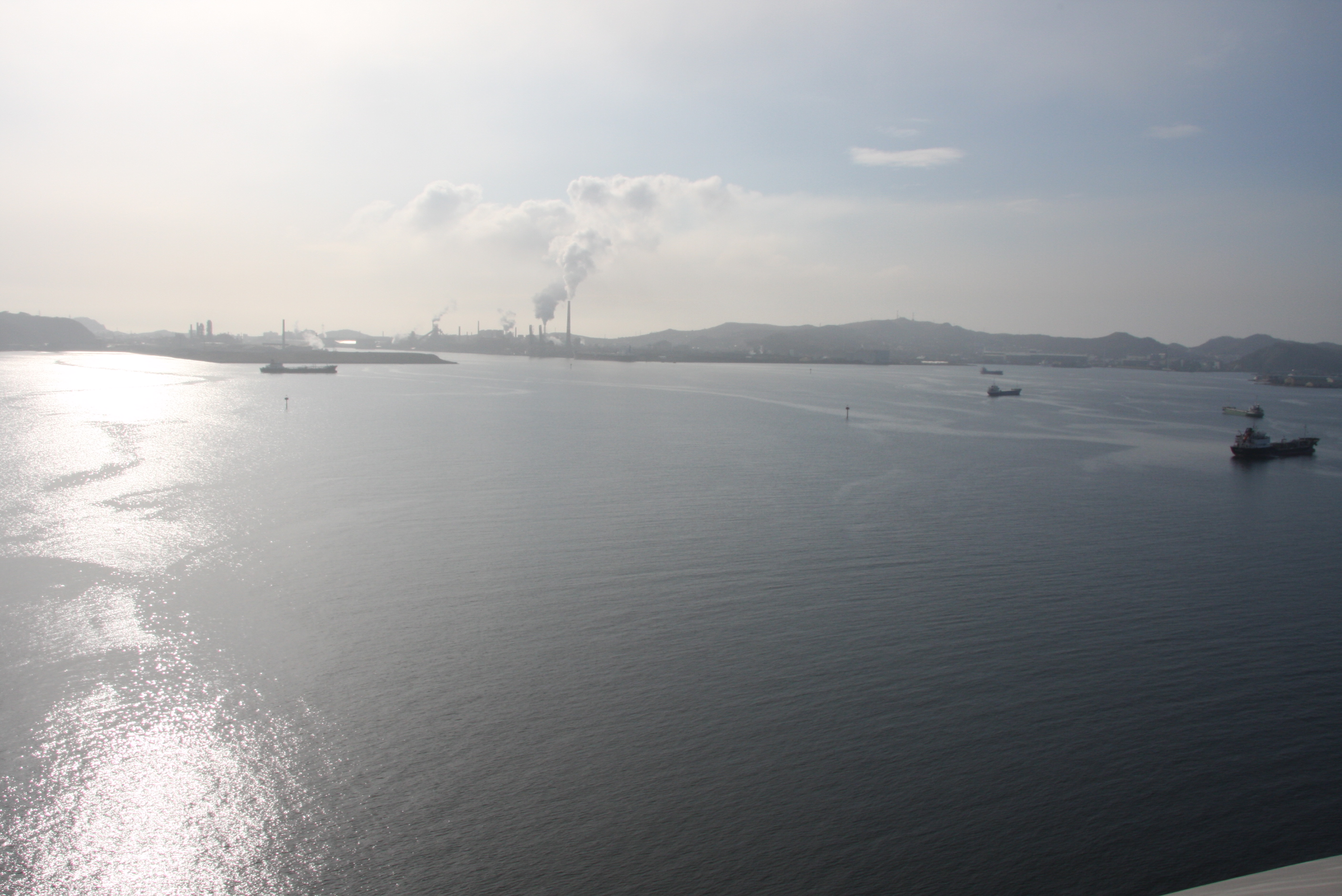 白鳥大橋から俯瞰する新日鐵住金室蘭製作所